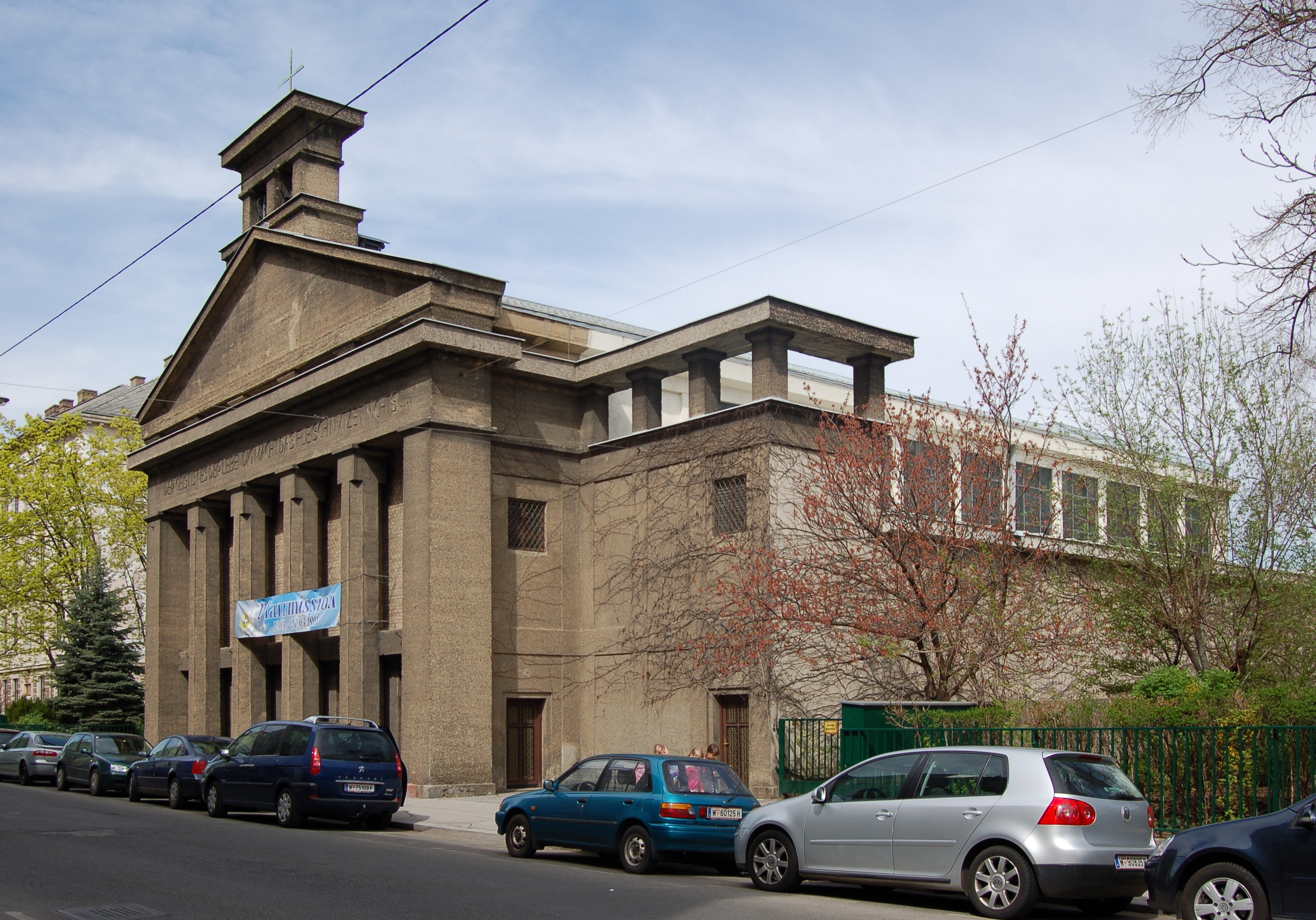 Schmelzer Pfarrkirche in Wien-Ottakring (Herbststraße 80).